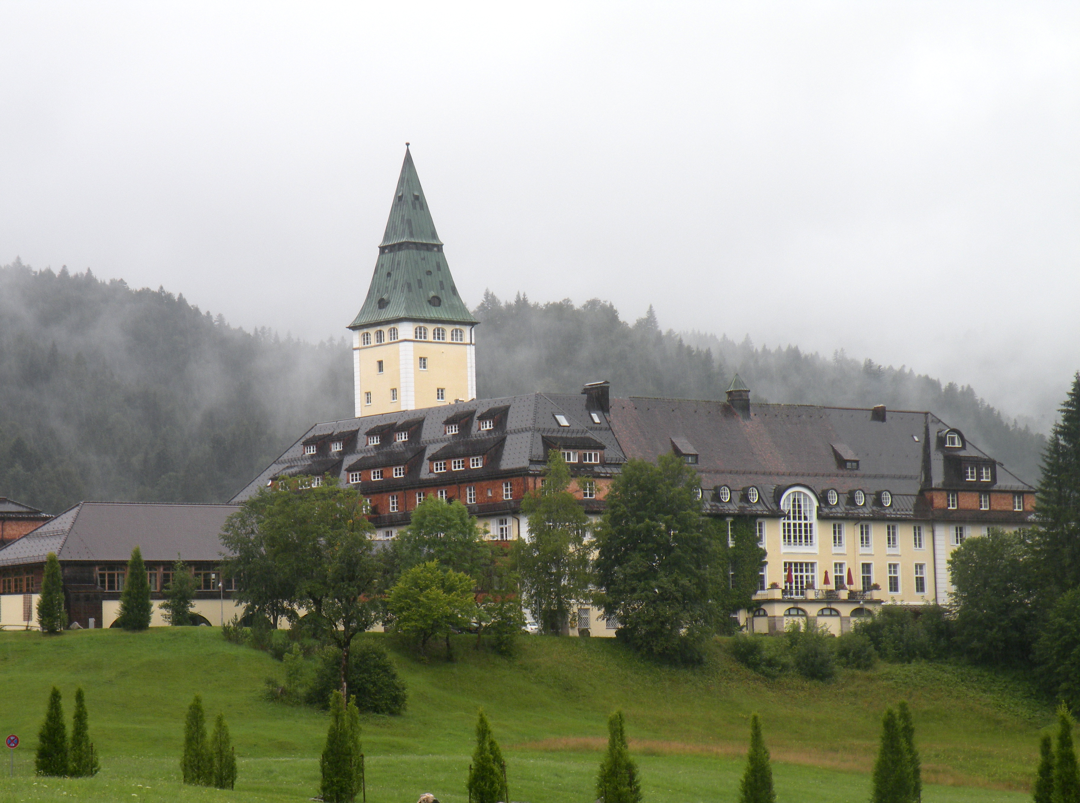 Schloss Elmau.